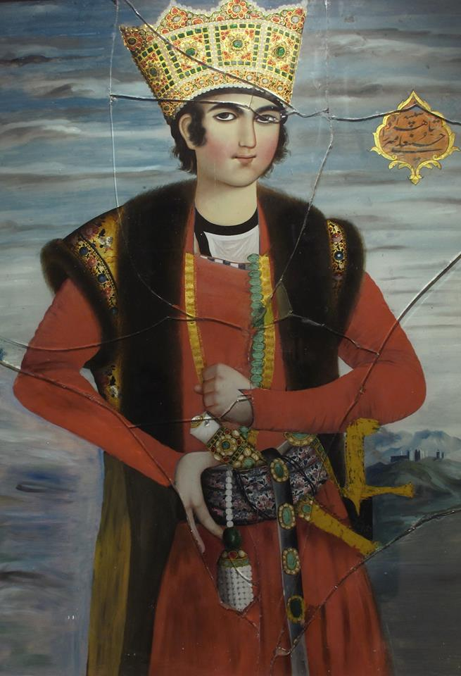 حسینعلی میرزا فرمانفرما، پسر فتحعلی‌شاه قاجار نقاشی پشت شیشه، منسوب به مهرعلی، محل نگهداری: کاخ گلستان